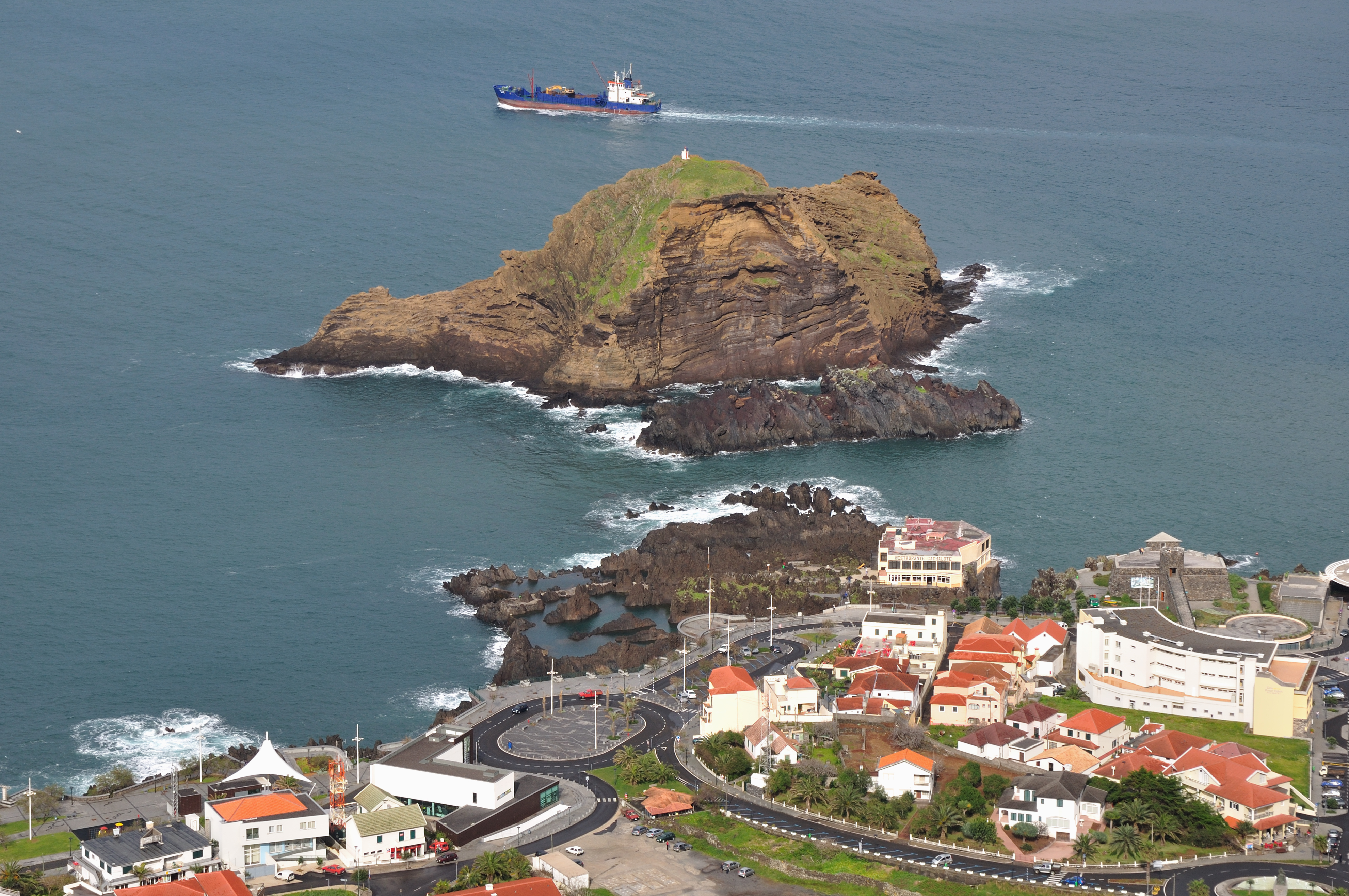 Portugal, Porto Moniz